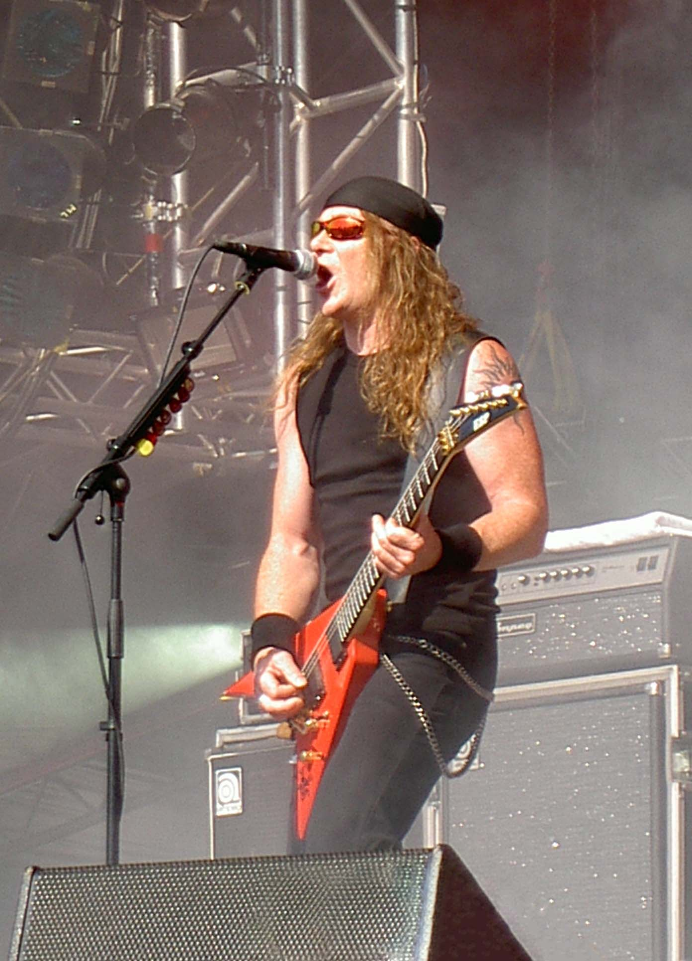 Kai Hansen at Tuska Open Air Metal Festival 2005 (Finland)